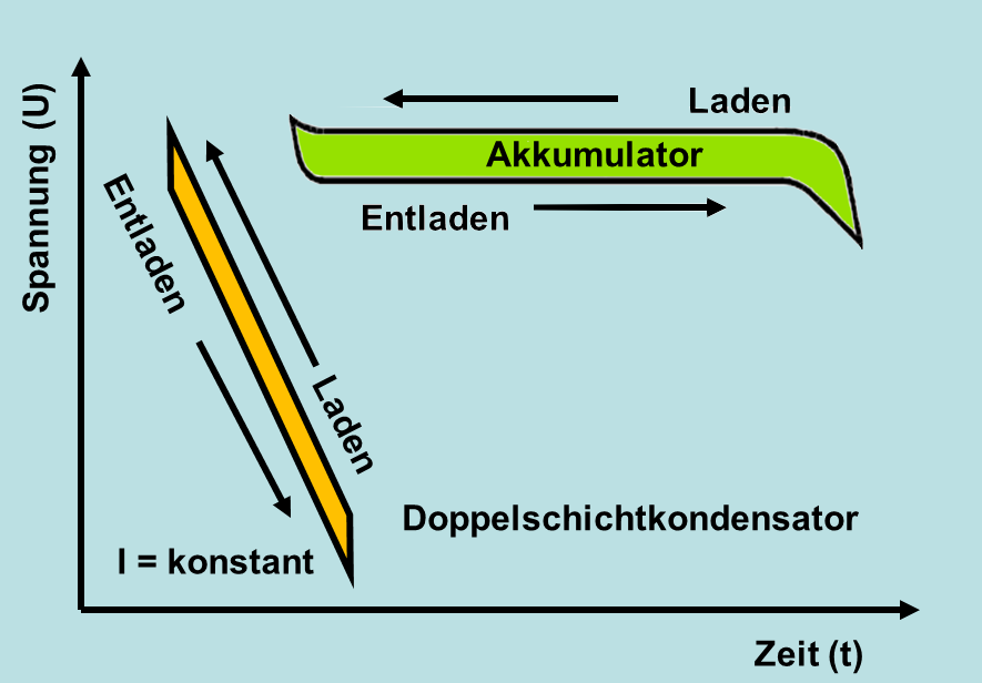 Vergleich der Lade- und Entladekurve eines Doppelschichtkondensators mit einem Akkumulator